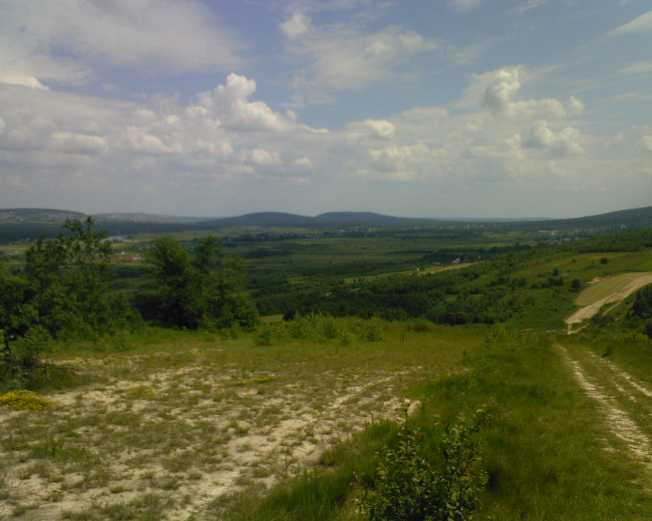 Psarska i Miejska. Widok z Radostowej.